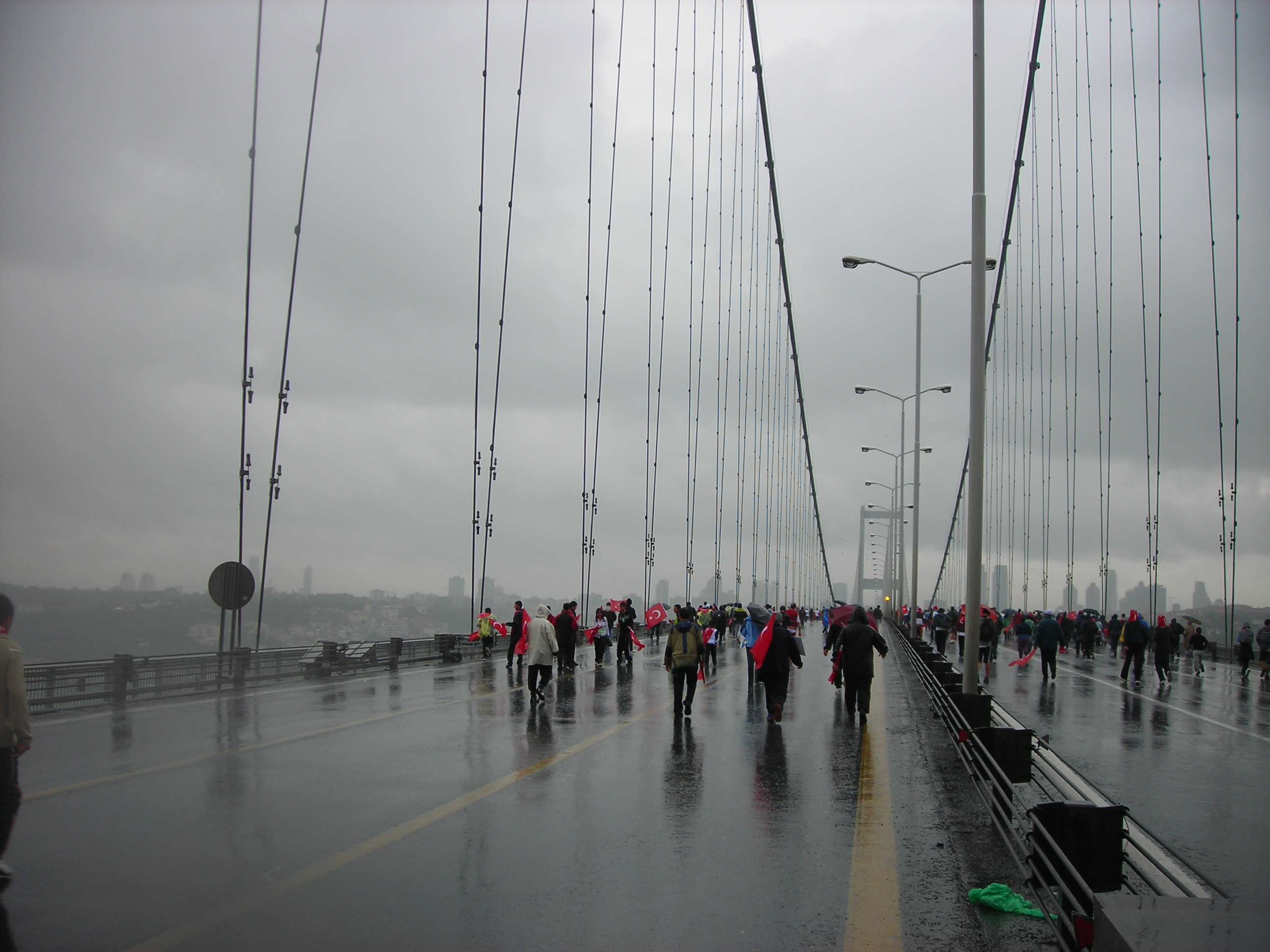 Avrasya Maratonu- Halk koşusu